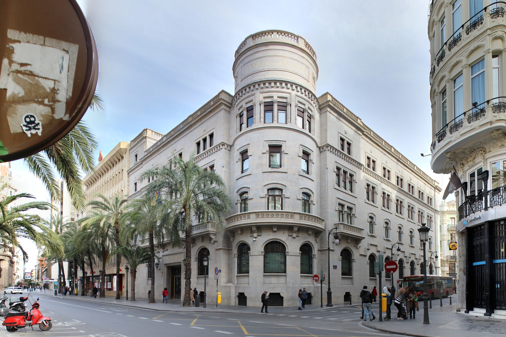 Edificio del Banco de España de José de Astiz Bárcena (1917) en Valencia